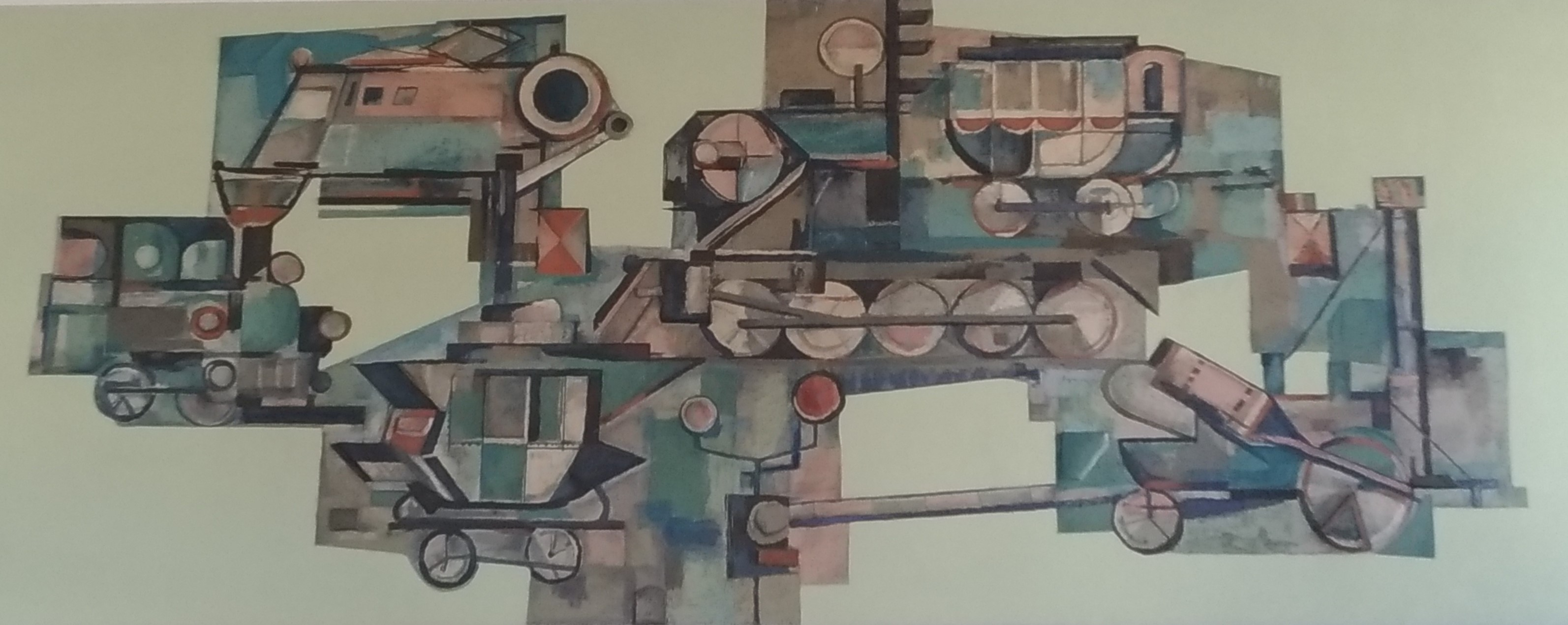 Malba Václava Boukala v hale vlakového nádraží v Českých Budějovicích s námětem historie vlakové dopravy